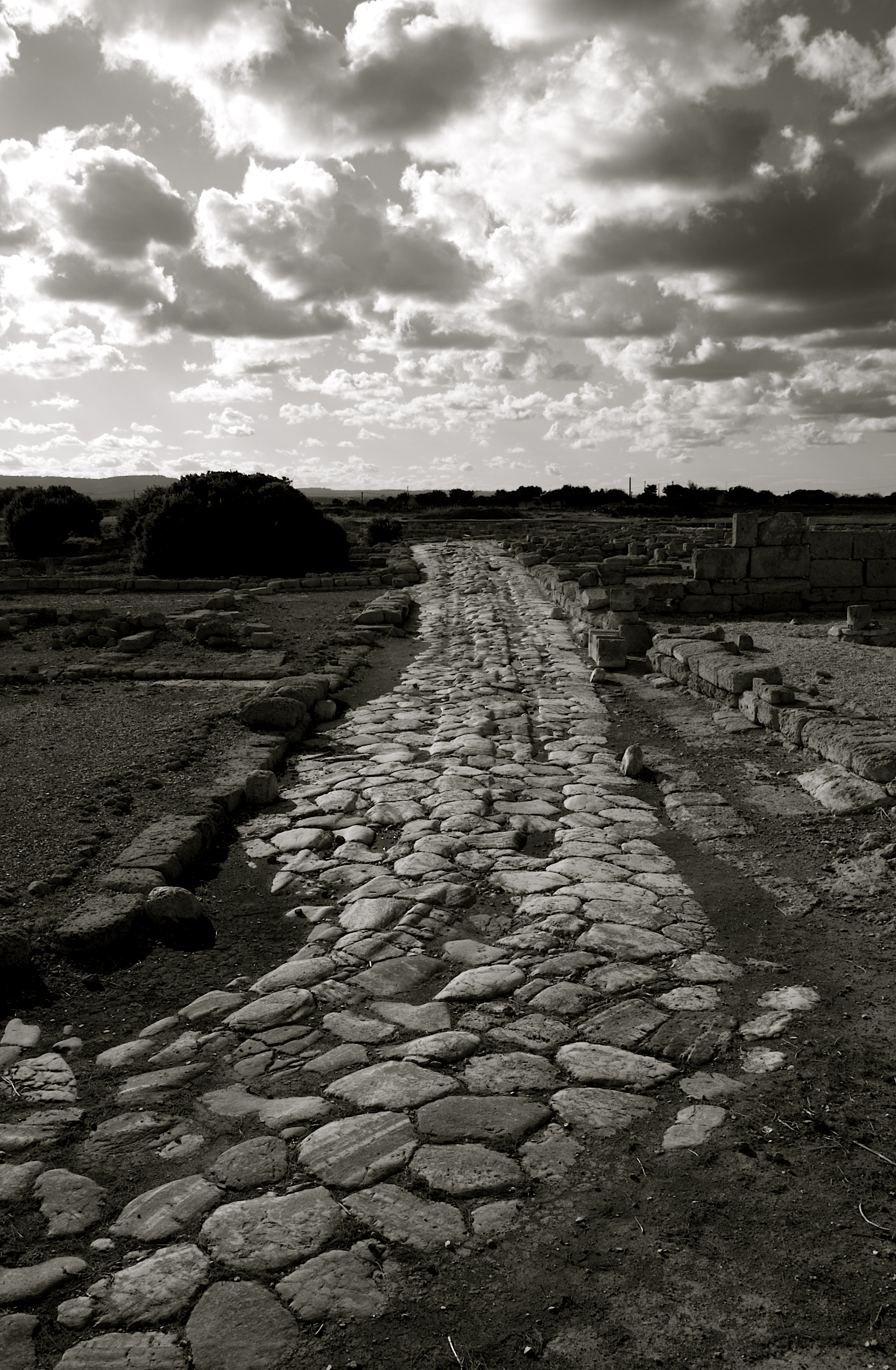 Un tratto lastricato della via Traiana ad Egnazia. Suggestiva visuale della Via Traiana in Egnazia.